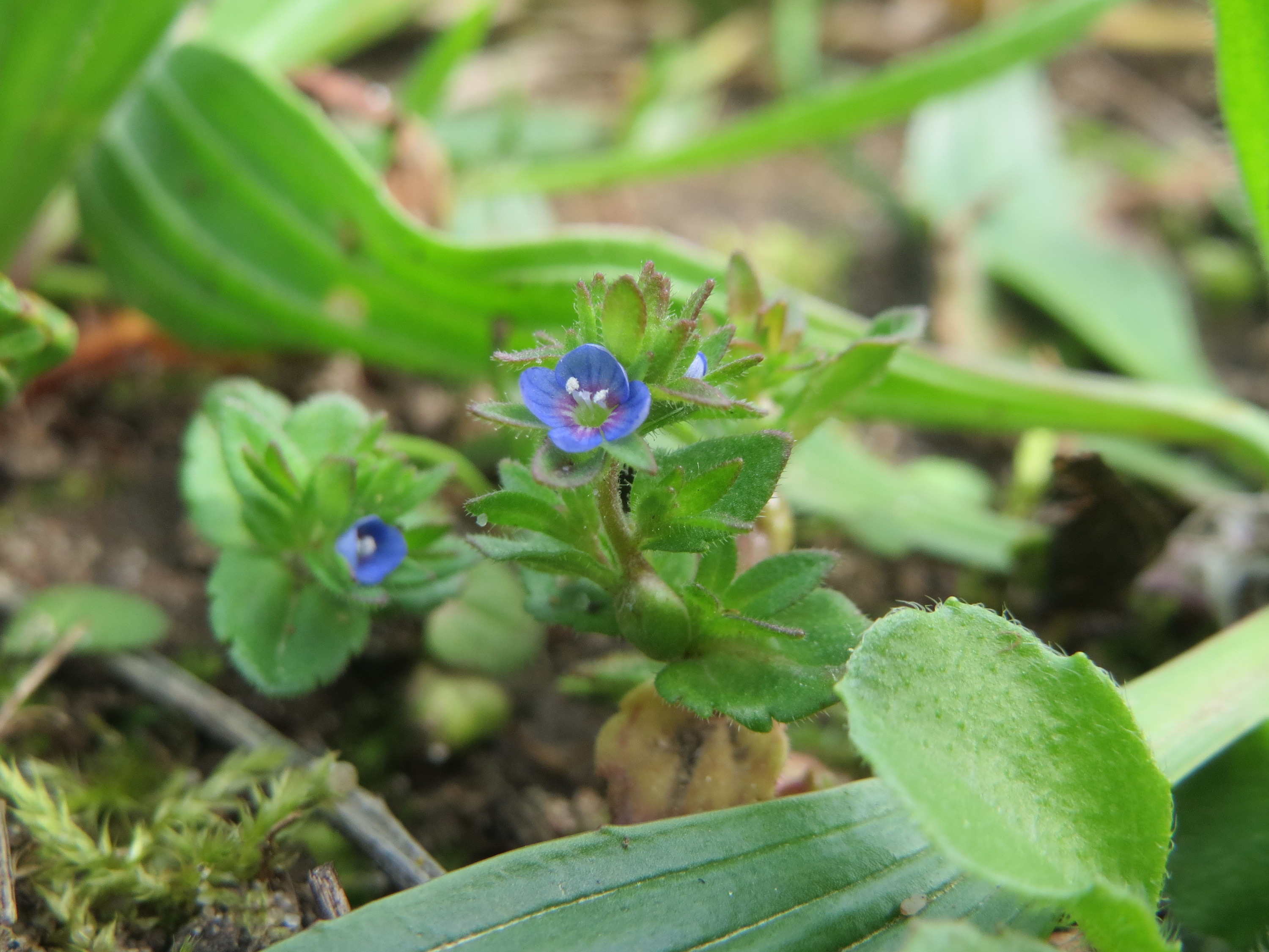 Frühlings-Ehrenpreis (Veronica verna) im Neuenheimer Feld in Heidelberg